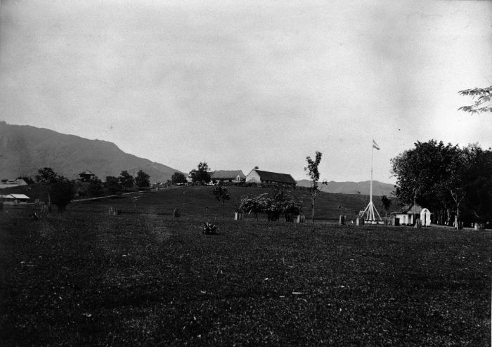 Foto. Fort van der Capellen, Sumatra`s Westkust